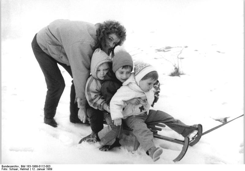 Frauenwald, Teilnehmer des Winterurlaubs der Landjugend ADN-ZB Schaar 12.1.89 Bez. Suhl: Jugend. Zu den insgesamt 6.500 Jugendlichen, die im Januar zum 31. Winterurlaub der Landjugend im Bezirk Suhl erwartet werden, gehören auch 670 aus dem Bezirk Schwerin. Sie sind in Ferienheimen und Privatquartieren in Frauenwald untergebracht. Angela Dreßler aus Sternberg versucht trotz des wenigen Schnees eine Schlittenpartie mit ihren Kindern.